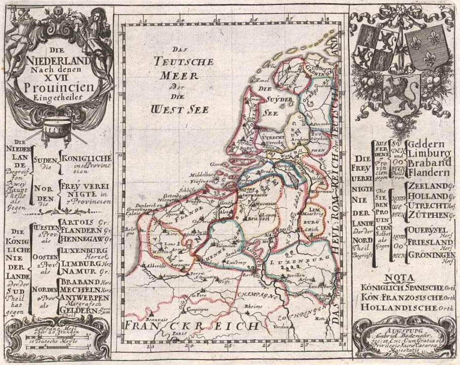 Karte der 17 Provinzen der Republik der Vereinigten Niederlande und der Österreichischen Niederlande aus dem Atlas Curieux (18. Jahrhundert)